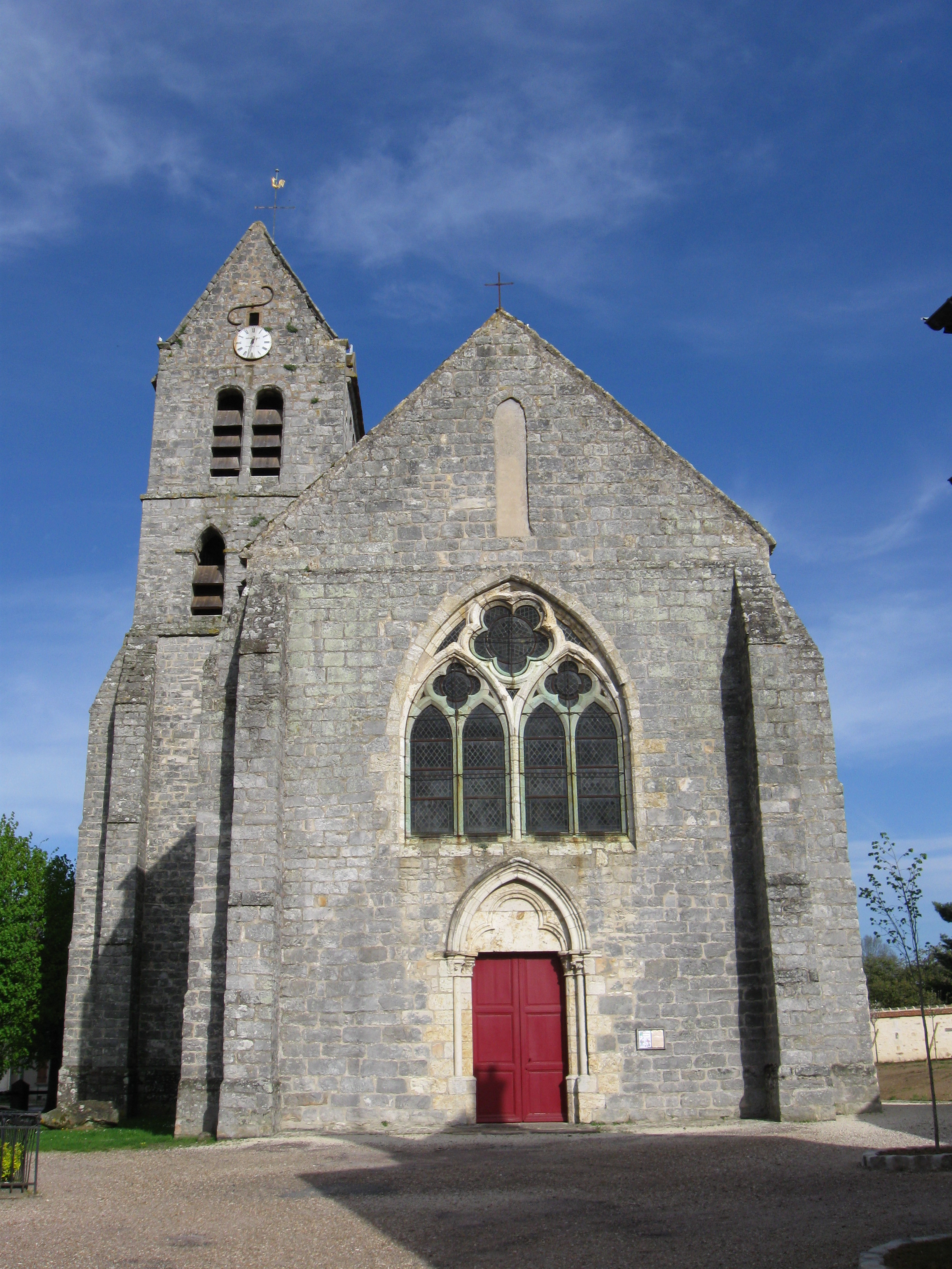 Église Saint-Étienne de Villiers-sous-Grez. (département de la Seine et Marne, région Île-de-France).